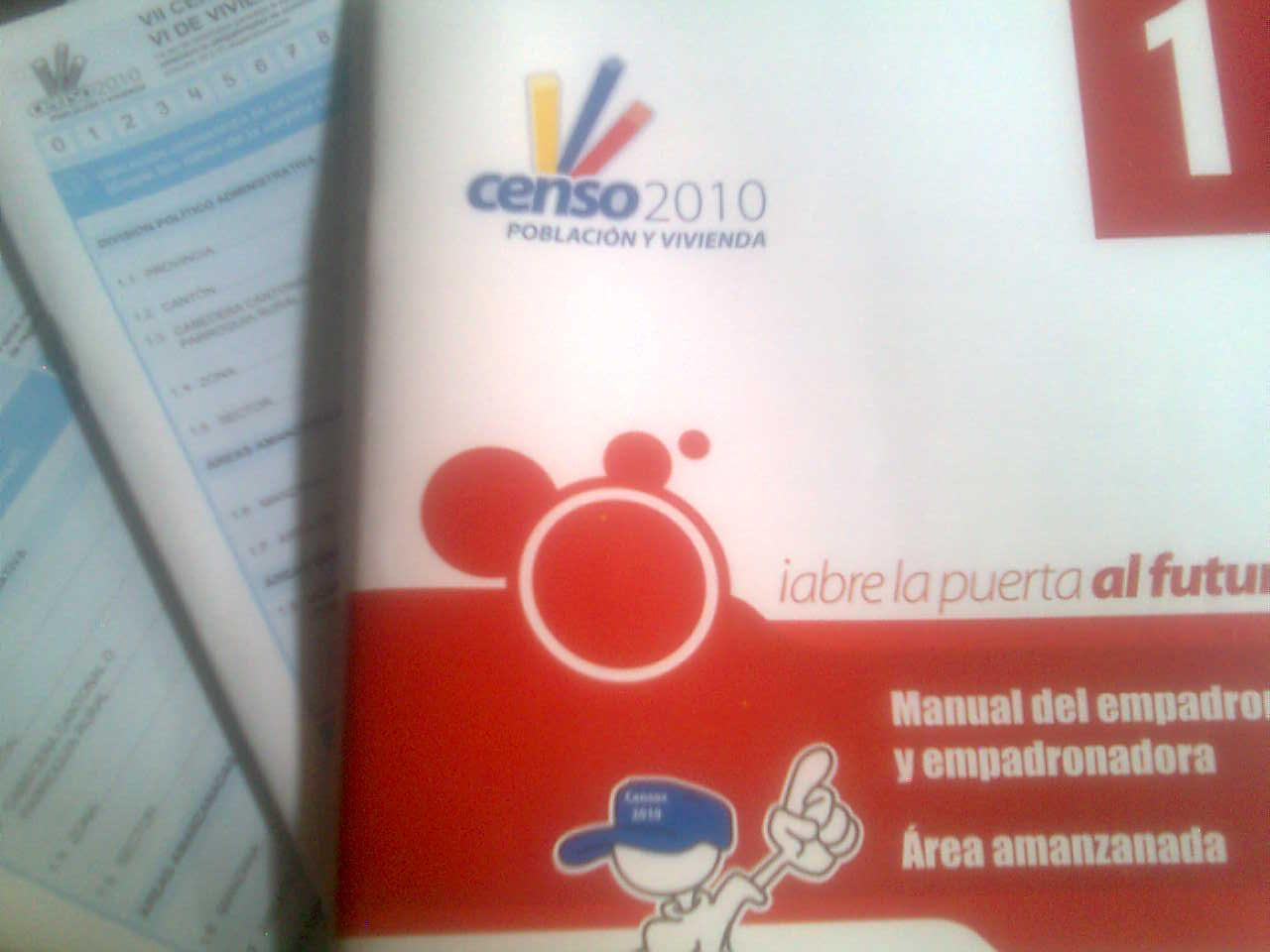 Foto del instructivo del empadronador.